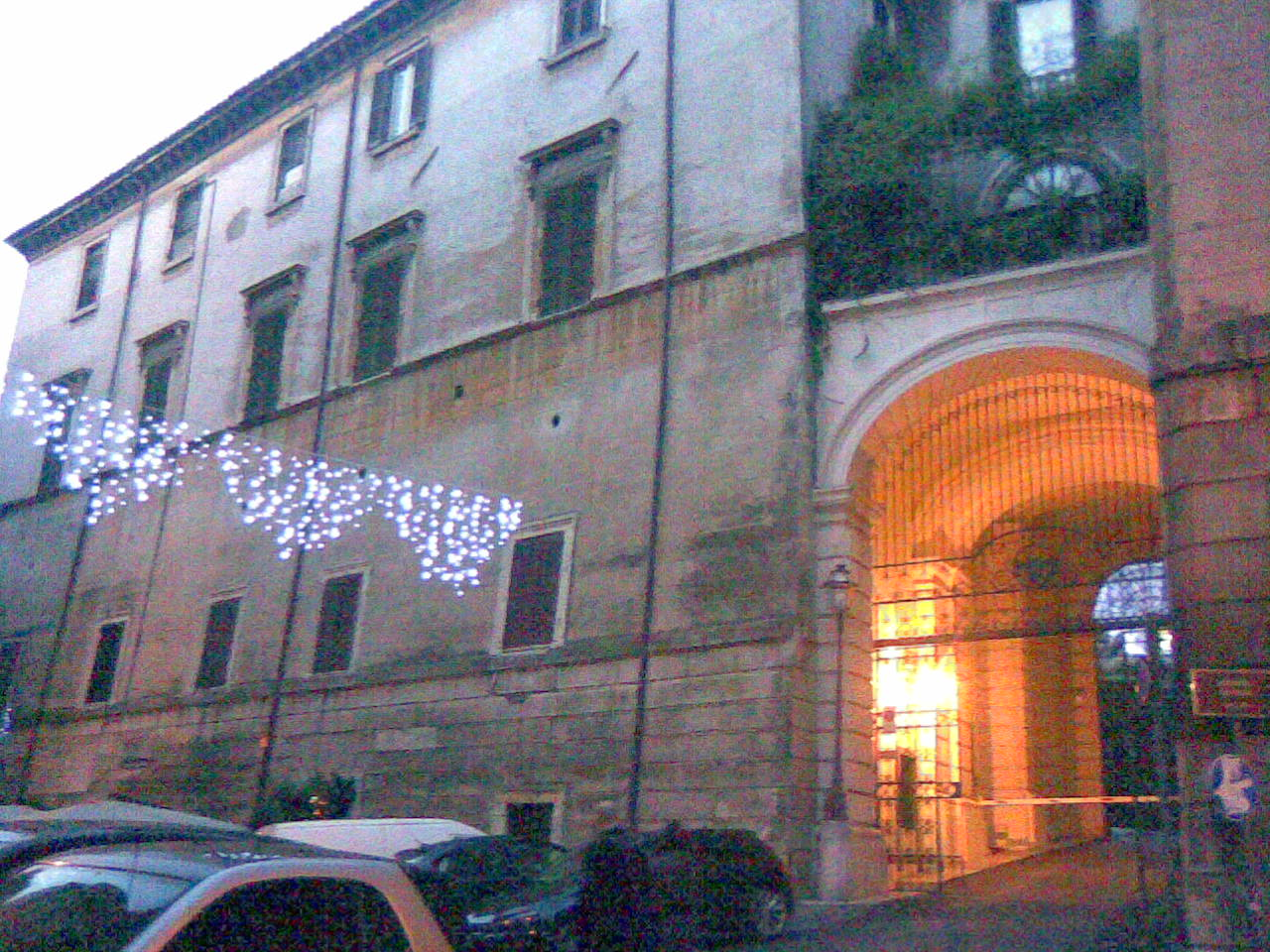 Ingresso di Palazzo Taverna su via Monte Giordano